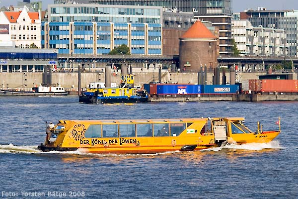 HADAG-Wassertaxi MS Nala unterwegs auf der Hafenfährlinie 73 Landungsbrücken–Oderhöft in Höhe der Überseebrücke.